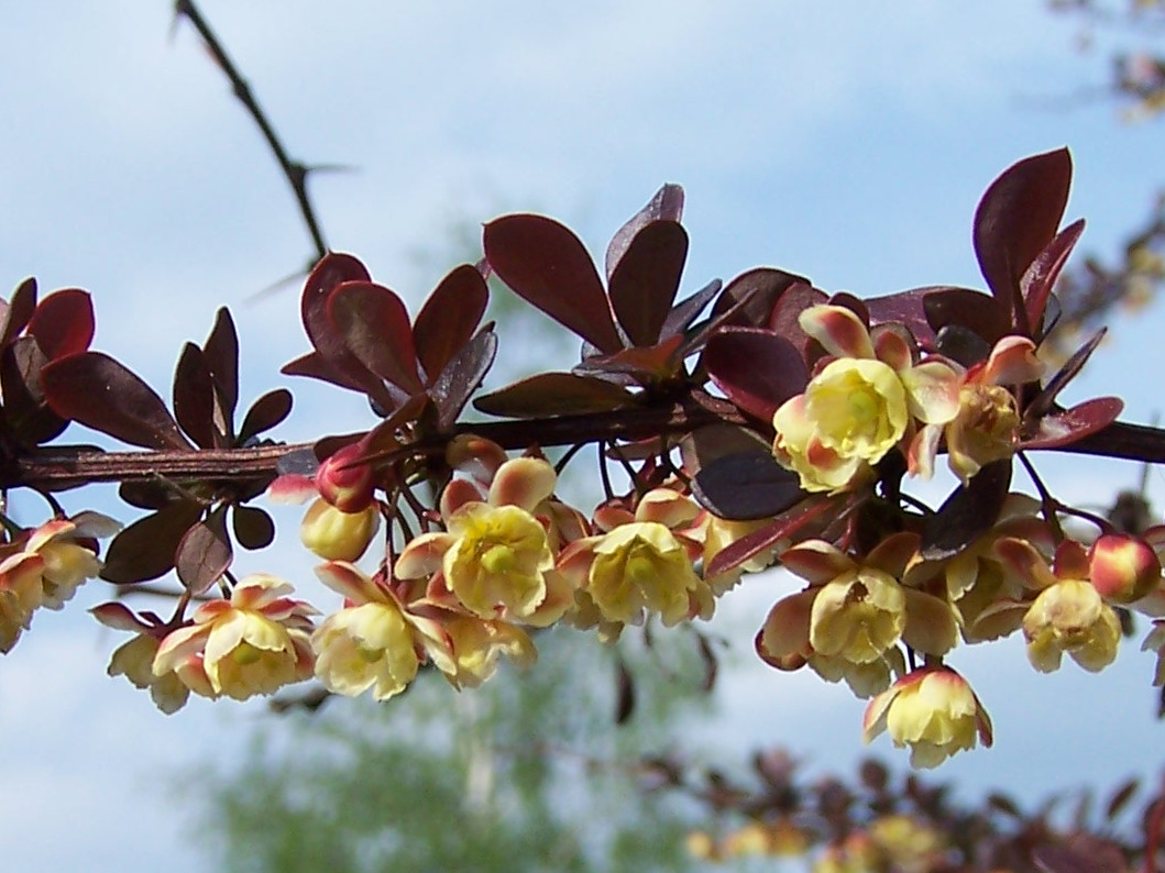 Berberis thunbergii `Atropurpureum` (pl. berberys Thunberga)